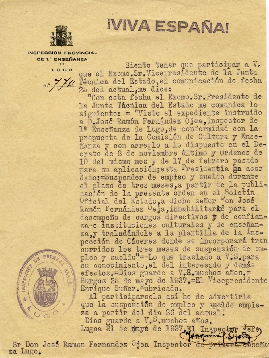 ...esta Presidencia ha acordado:=Suspender de empleo y sueldo durante el plazo de tres meses, a partir de la publicación de la presente orden en el Boletín Oficial del Estado, a dicho señor Don José Ramón Fernández Ojea, inhabilitarle para el desempeño de cargos directivos y de confianza e instituciones culturales y de enseñanza, y trasladándole a la plantilla de la Inspección de Cáceres donde se incorporará trascurridos los tres mees de suspensión de empleo y sueldo=